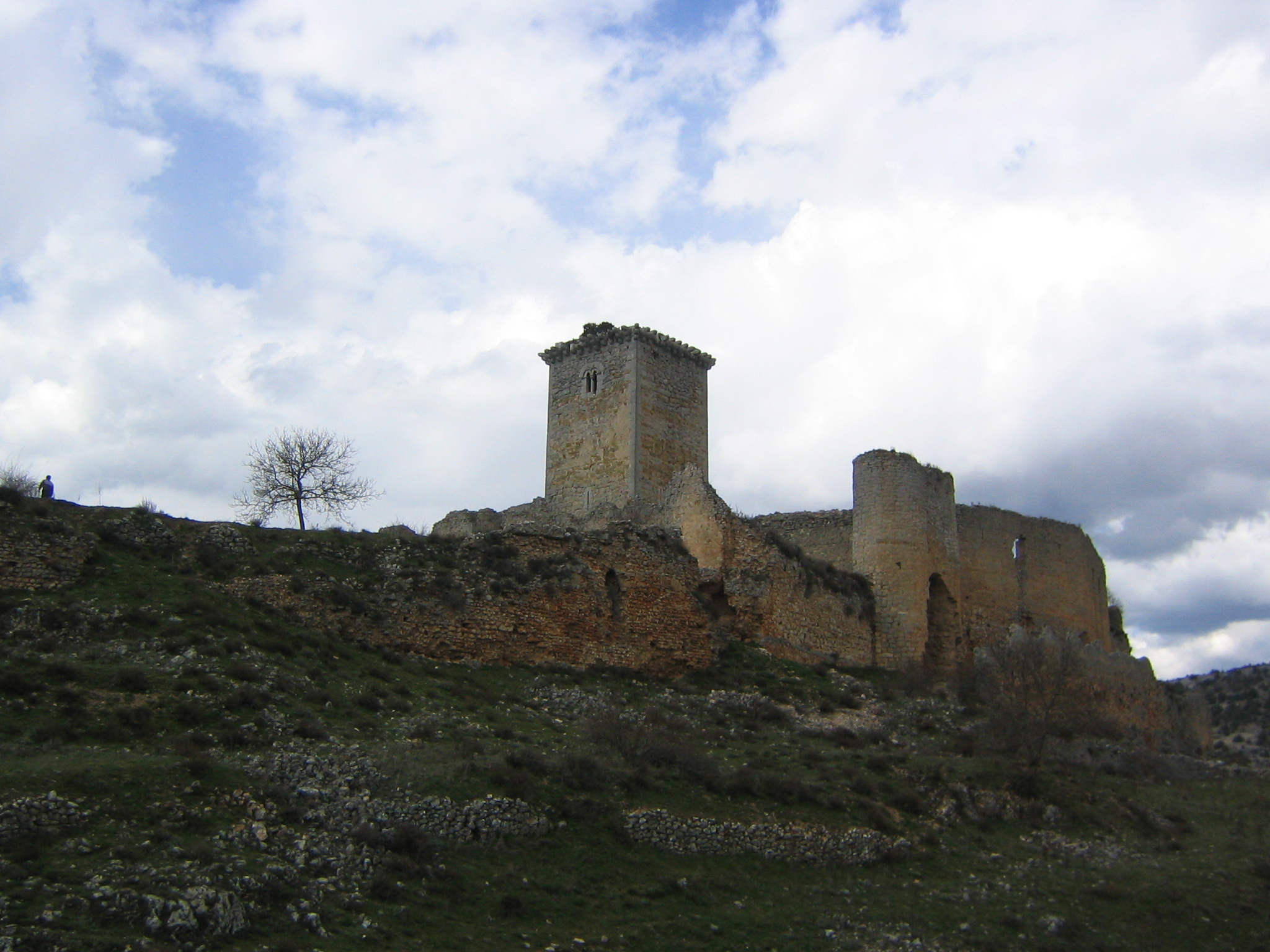 Castillo de Ucero, Soria (Castilla León) (España).